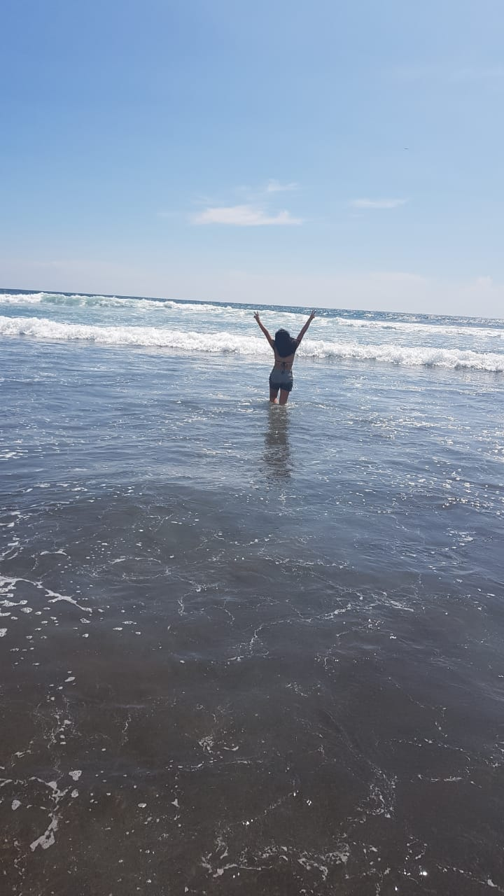 Playa en Barra de santiago, Ahuachapán, El Salvador.